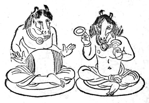 鳩槃荼の図。